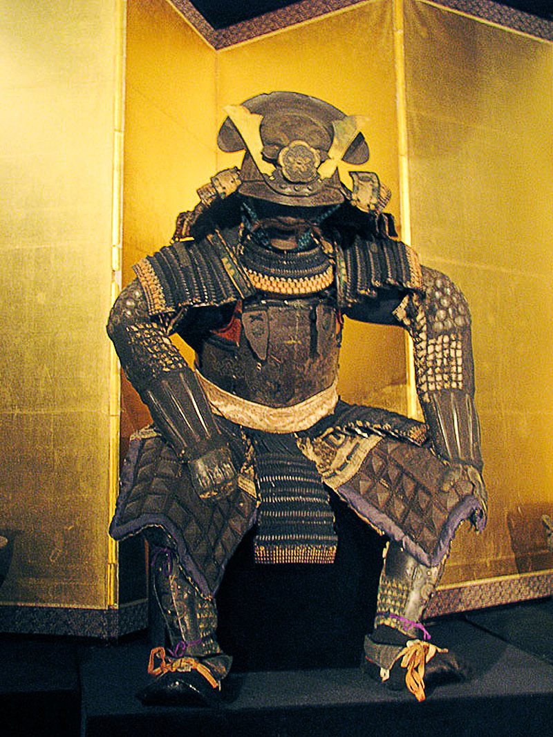 Доспехи Оды Нобунаги, фото сделано на выставке "Доспехи и оружие самураев" в музее народов Востока в Москве.